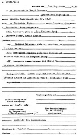 Свидетельство о смерти Василия Бандеры, брата Степана Бандеры, в концлагере Освенцим